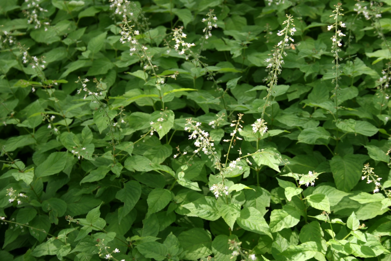 Circaea lutetiana: Habit.